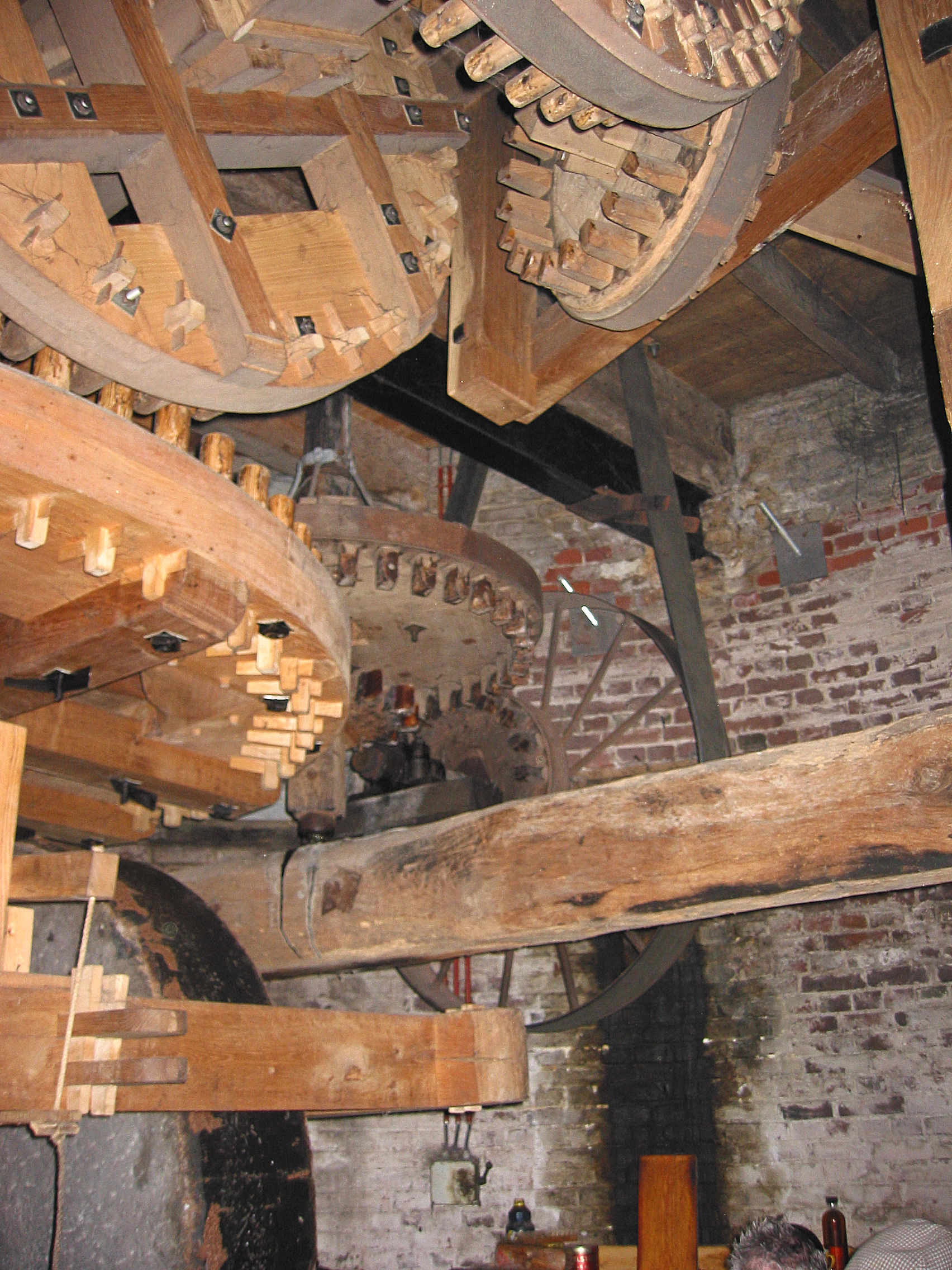 Holten's Molen aandrijvingen olieslagerij, Deurne, the Netherlands